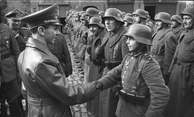 Auszeichnung des Hitlerjungen Willi Hübner ADN-ZB/Archiv 9.3.1945 II. Weltkrieg 1939-45 Deutsch-Sowjetische Front: Reichspropagandaminister Goebbels begrüßt in Lauban (Niederschlesien) den mit dem EK II ausgezeichneten 16jährigen Willi Hübner, der während der Kämpfe um die Stadt im März 1945 im Schützengraben eingesetzt wurde. [Joseph Goebbels, Willi Hübner]